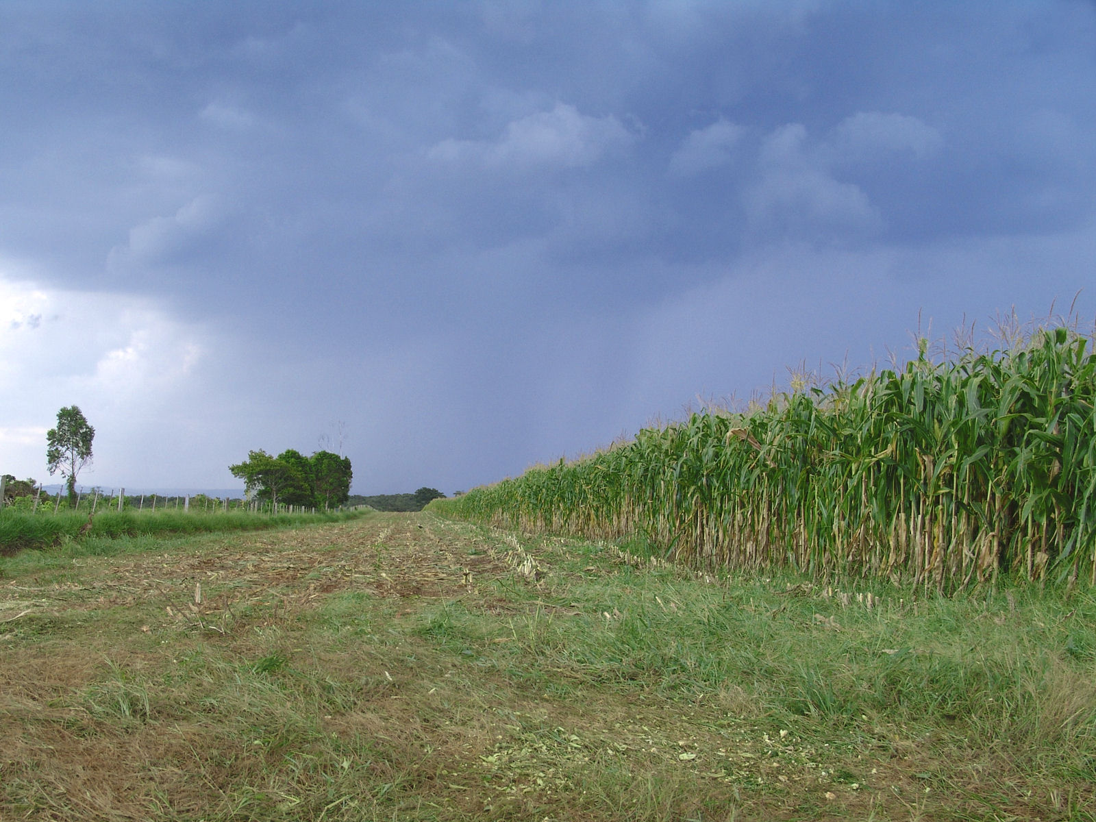 Colheita em milharal em Avaré, São Paulo, Brasil